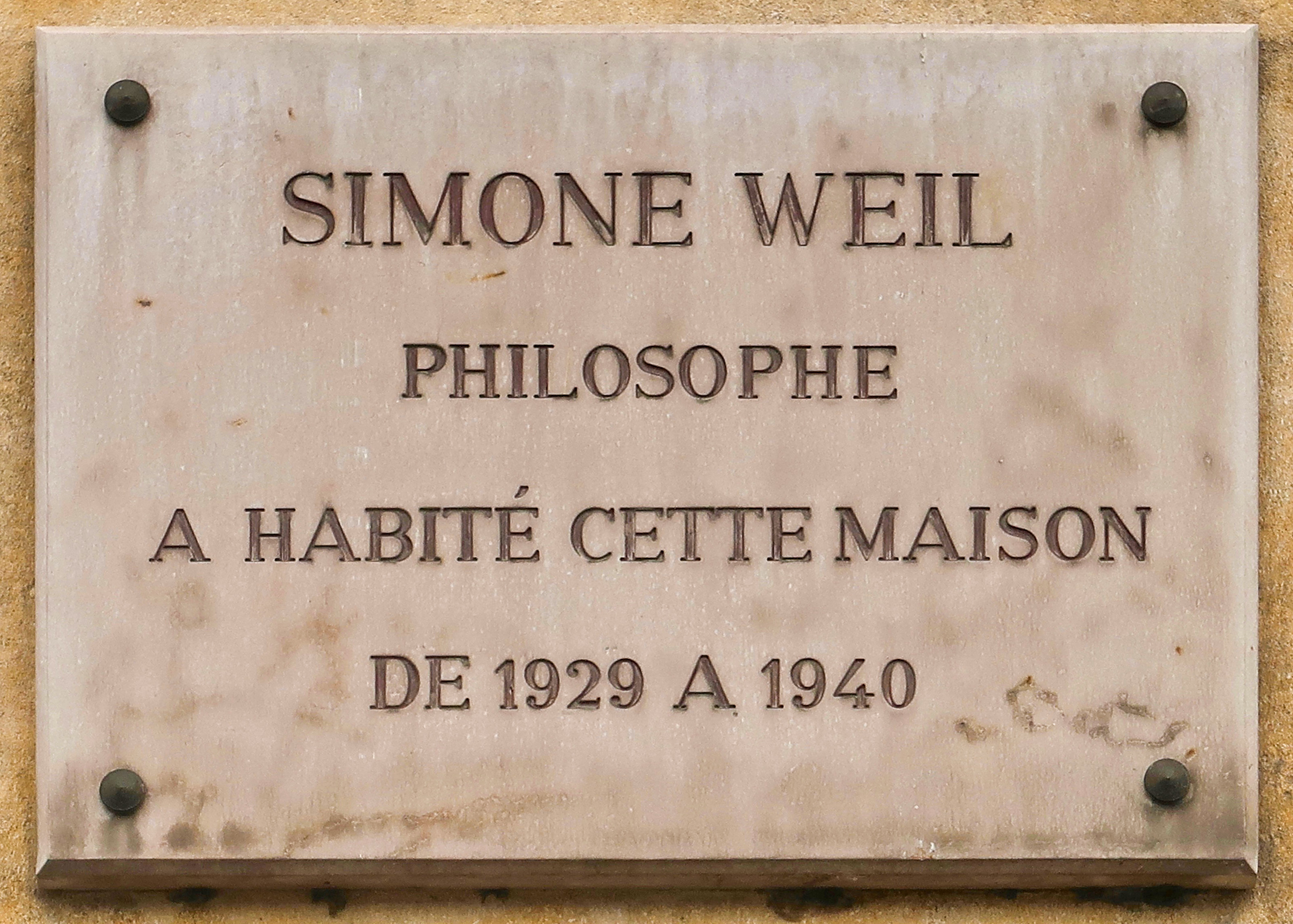 Plaque en hommage à la philosophe Simone Weil, 3 rue Auguste-Comte (Paris, 6e), où elle habita de 1929 à 1940.